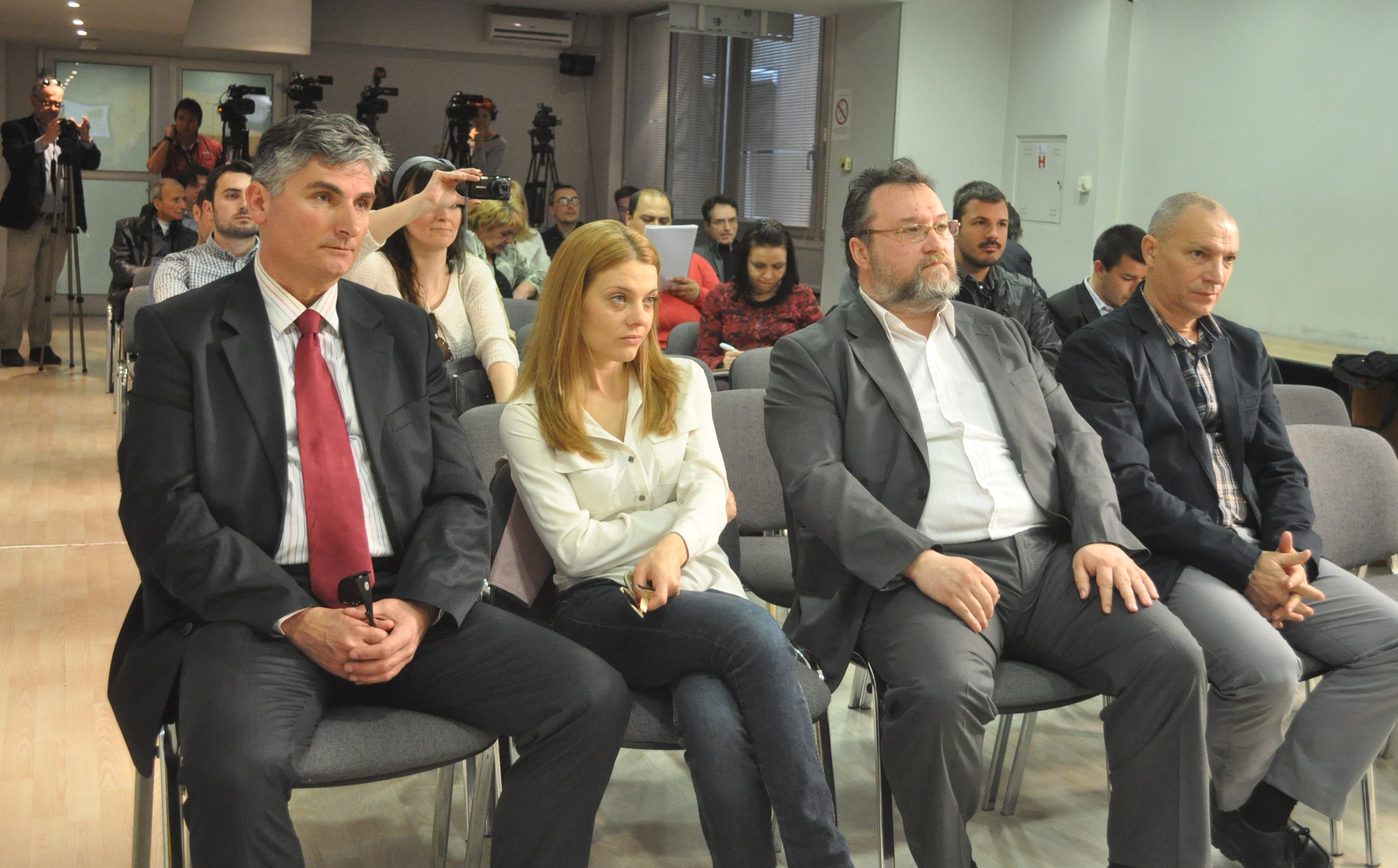 Moderna vmrovska trojka - makedonska opozicija